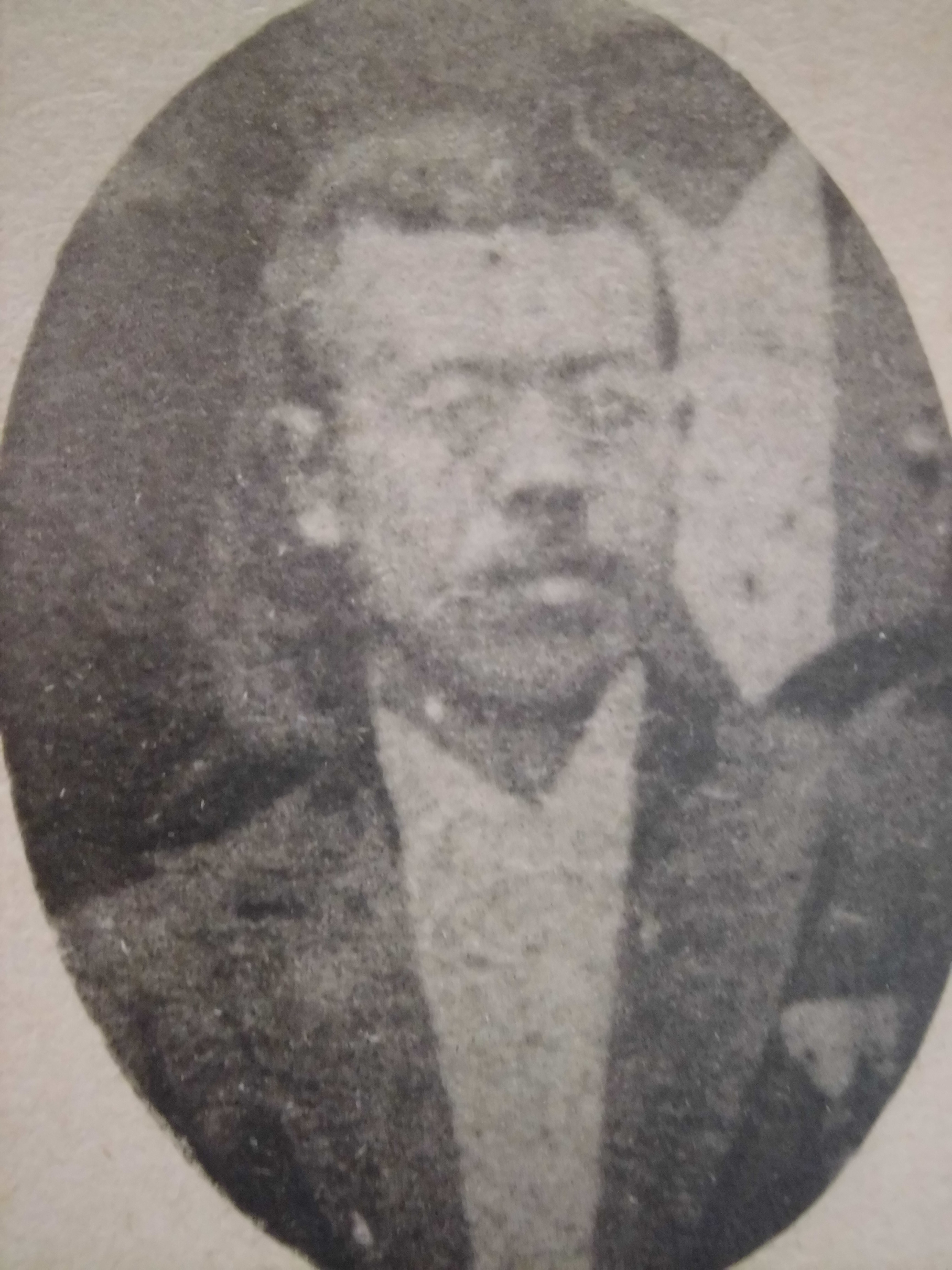 稲田藤治郎（Inada Touzirou）